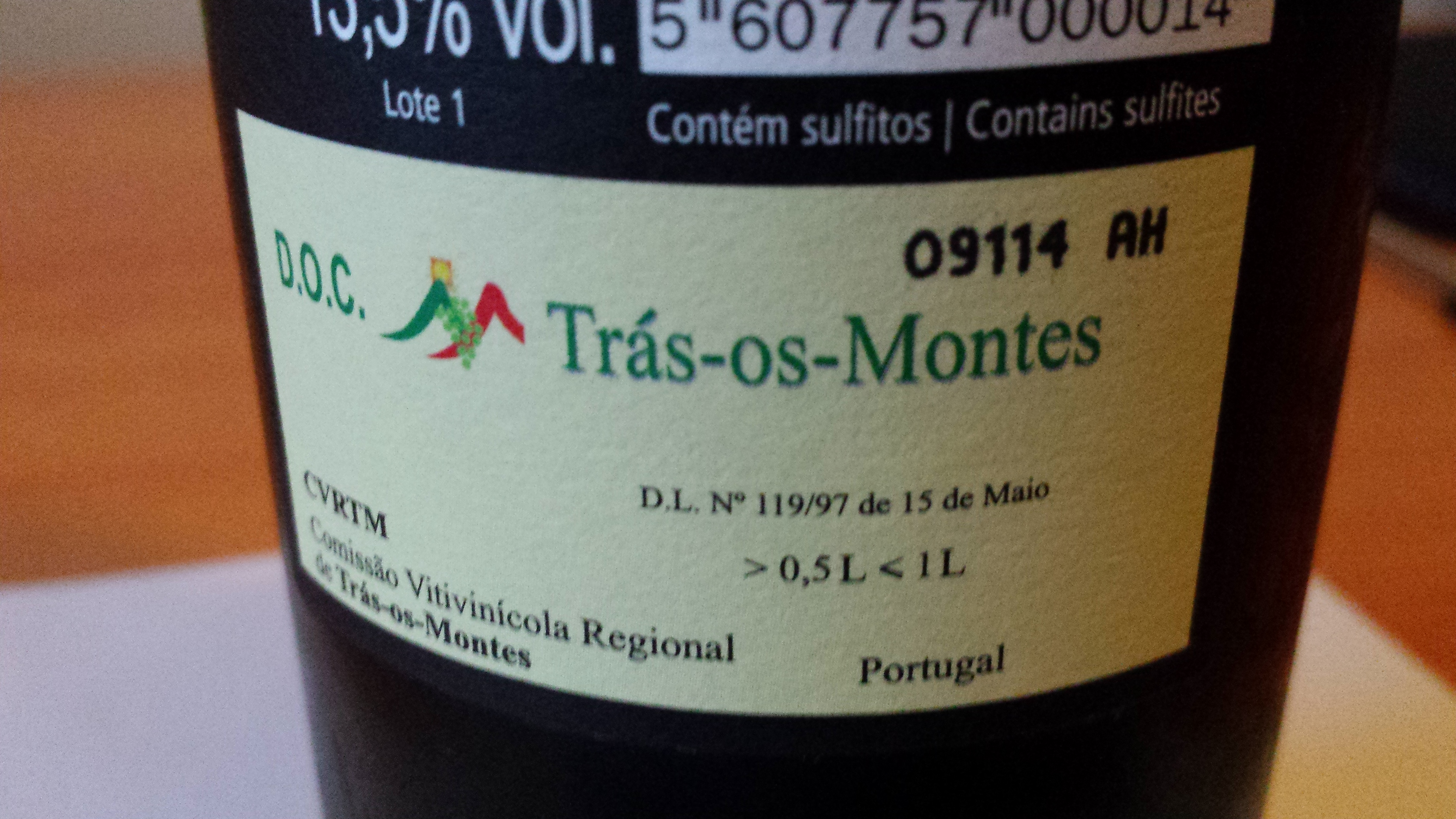 DOC Trás os Montes Portugal